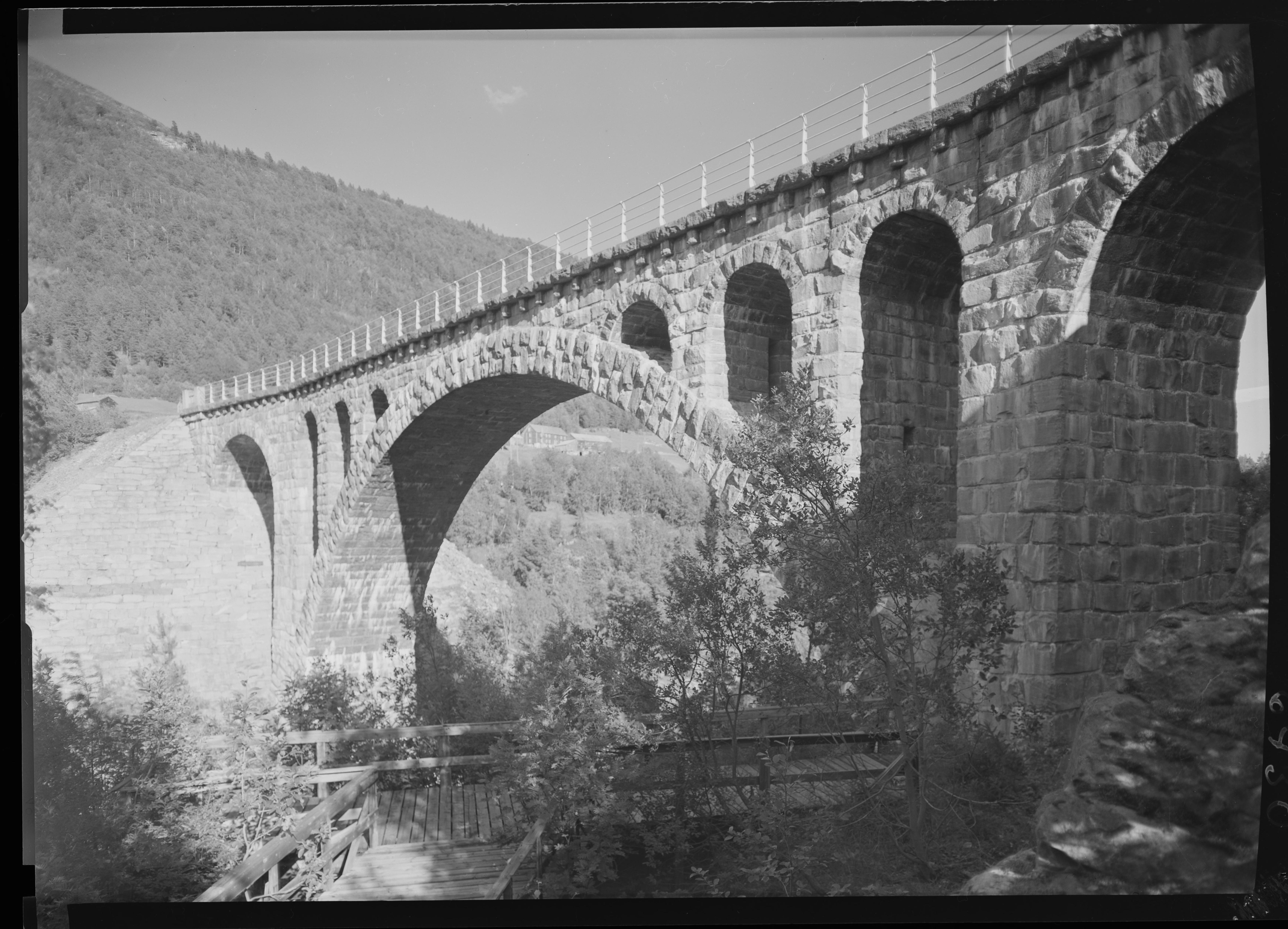 Bildet er hentet fra Nasjonalbibliotekets bildesamling. Anmerkninger til bildet var: Fotograf : ukjent Kylling,Romsdalen, Rauma, Møre og Romsdal